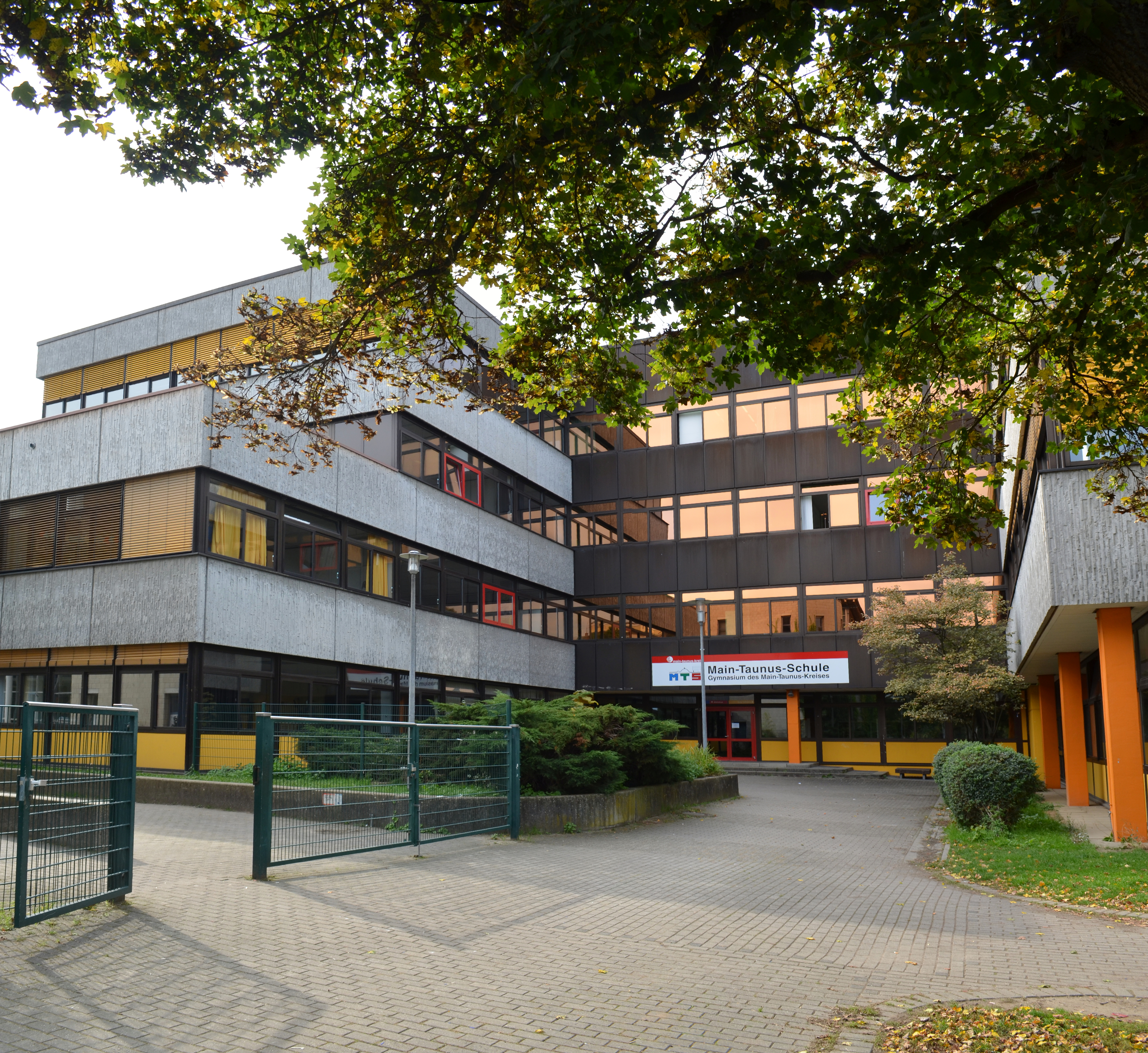 Hofheim, Main-Taunus-Schule